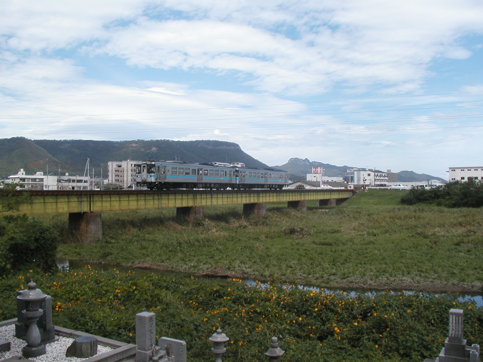 屋島を背景に春日川を渡る高徳線